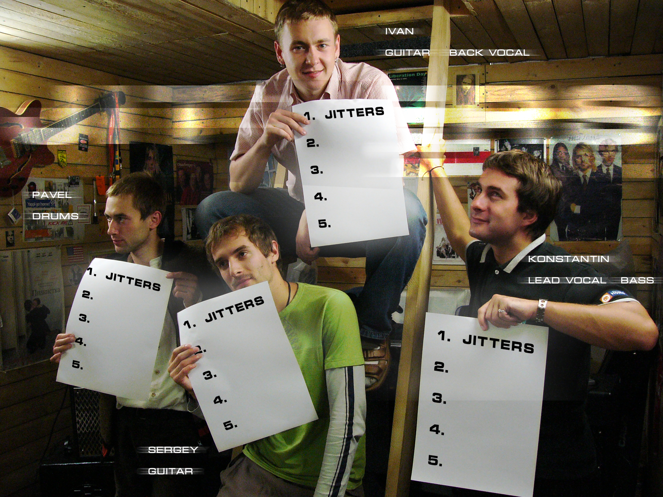 Беларуская (тарашкевіца): Jitters напярэдадні імпрэзы самотніку “Pick Me Up” (2006).